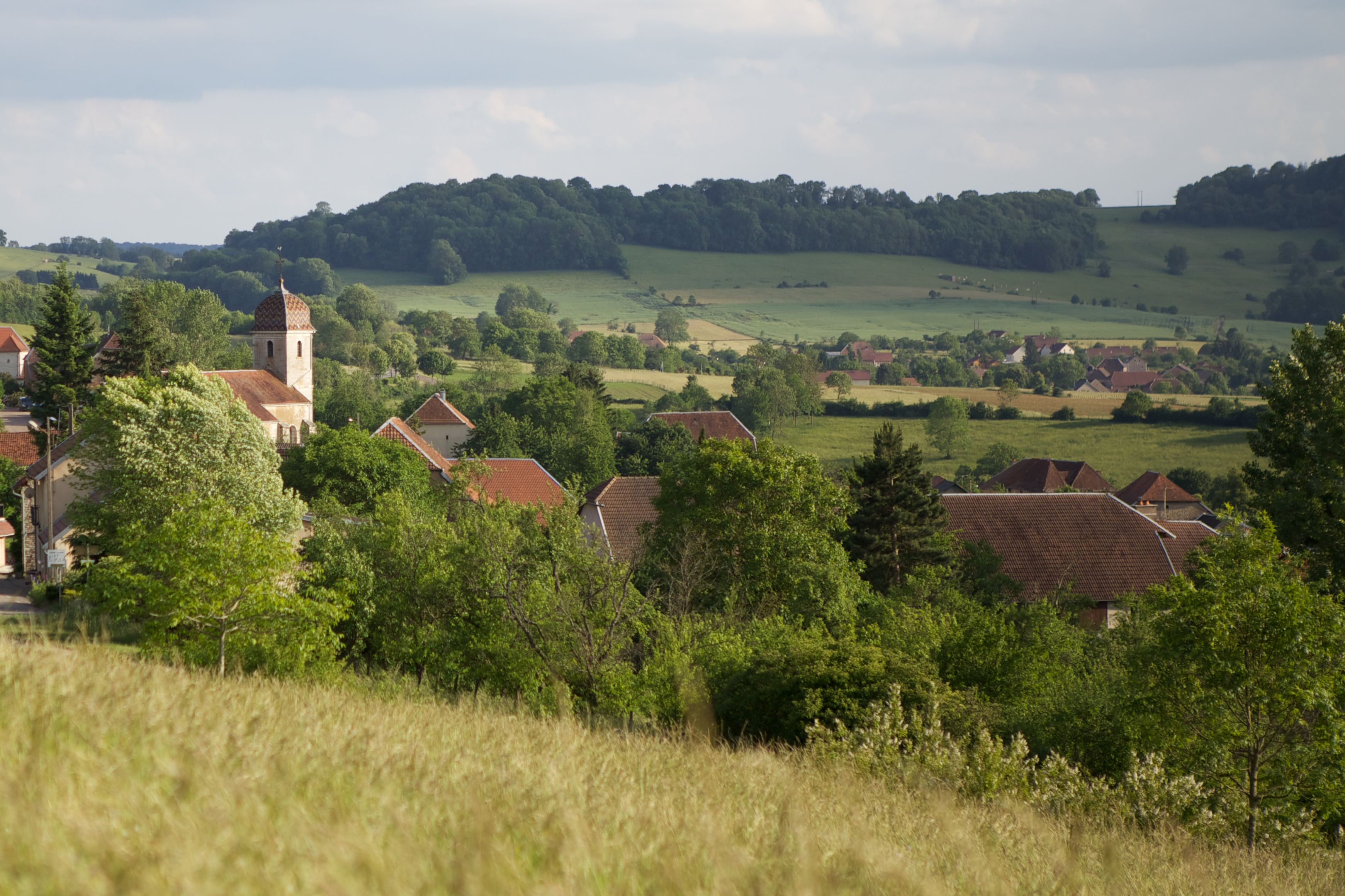 Vue du village de Romain la Roche, France (25)